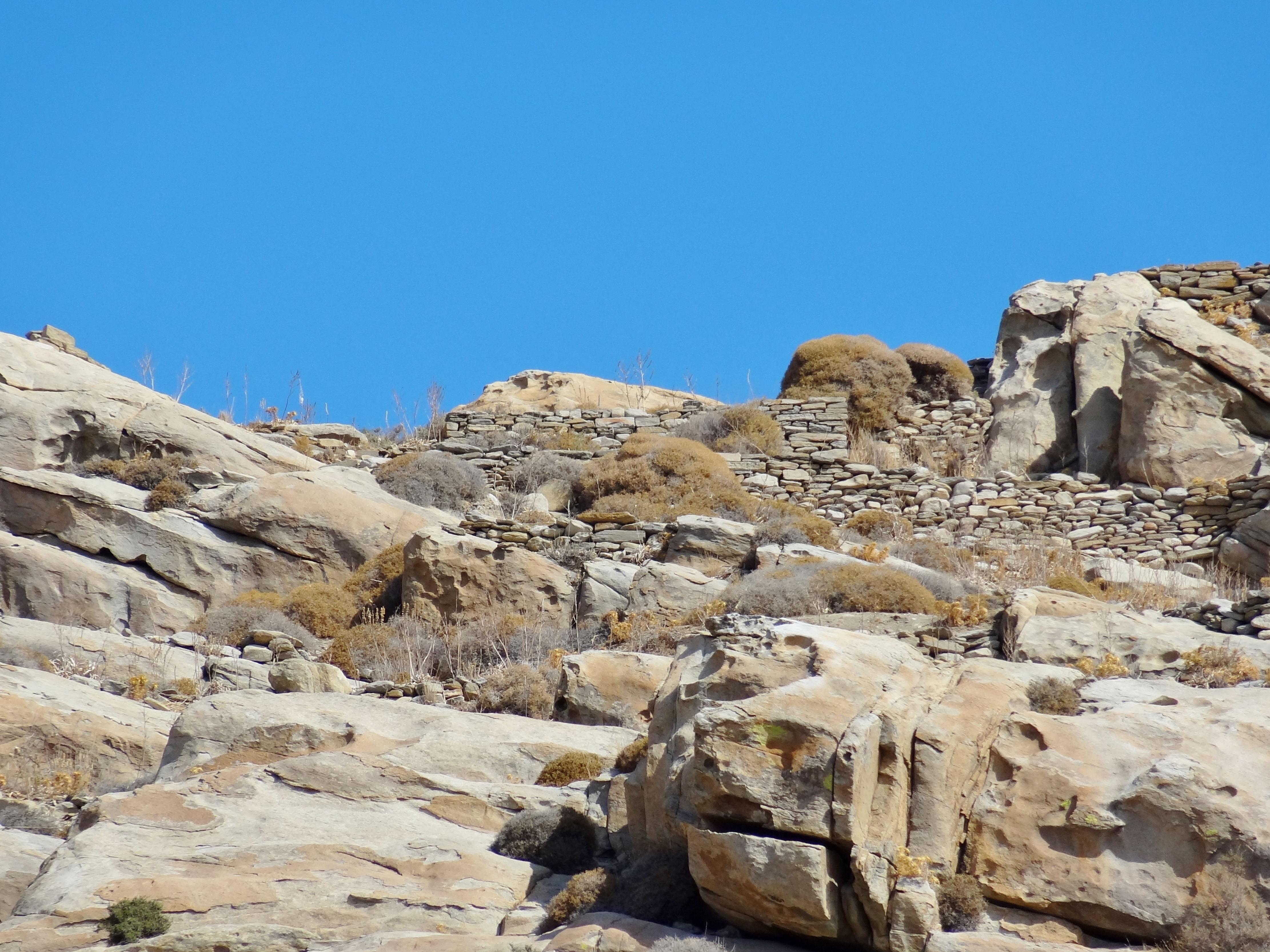 Mykenischen Akropolis von Koukounaries bei Naousa auf Paros, Kykladen, Griechenland